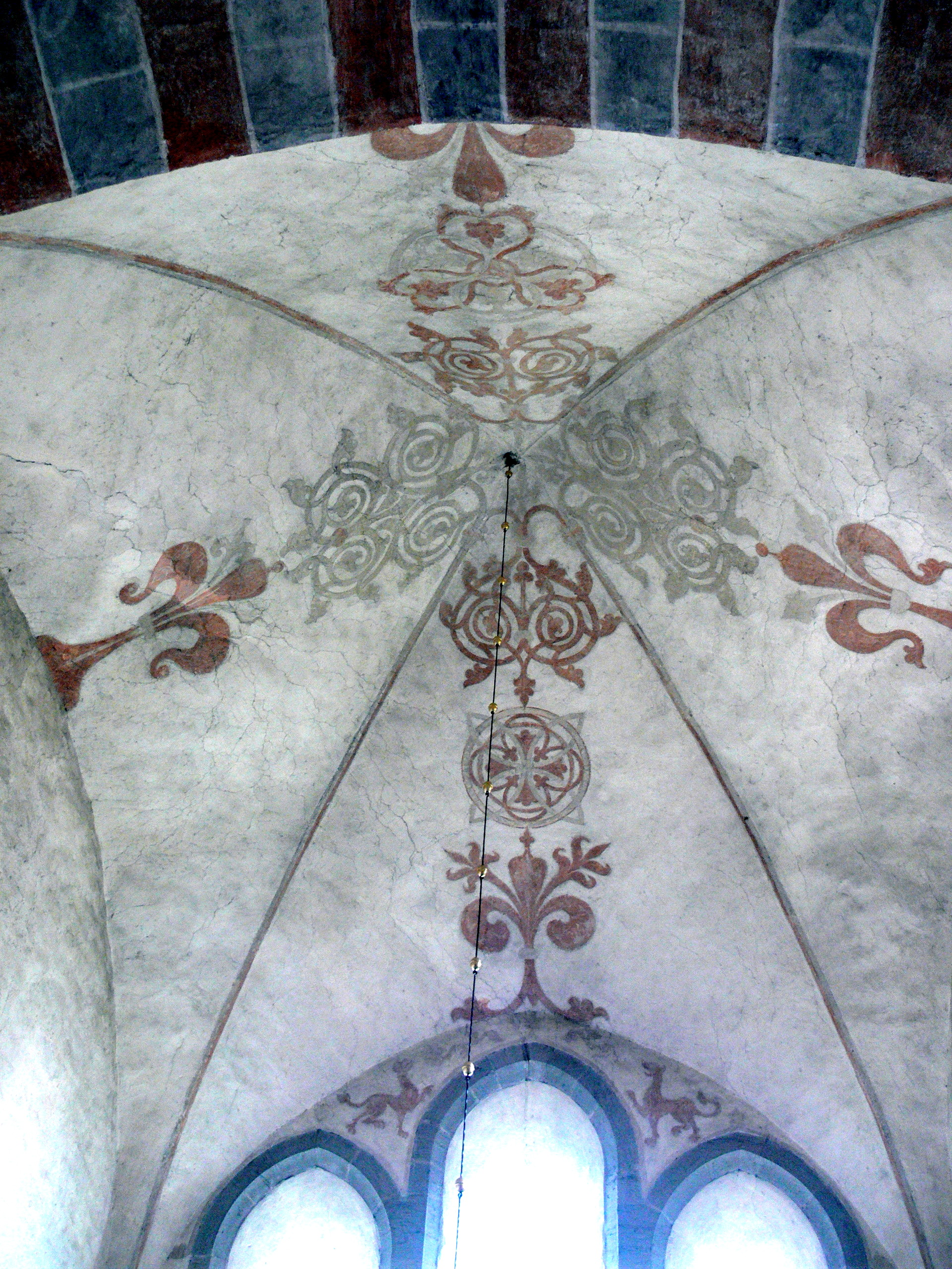 Boge kyrka auf Gotland. Gotische Malerei im Gewölbe